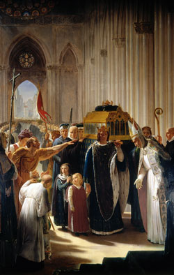 Philippe III apportant à Saint-Denis les reliques de Saint Louis, son père